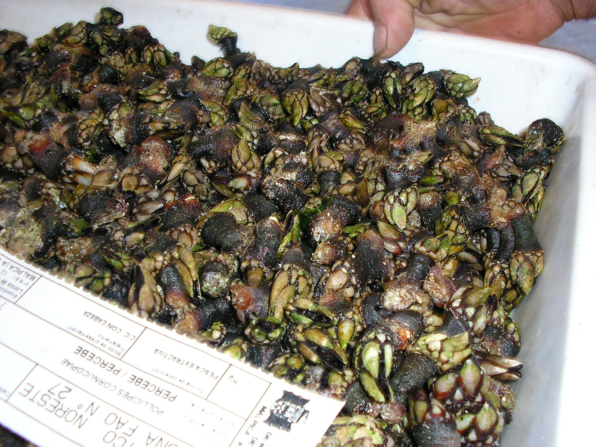 Percebes de una lonja de A Coruña (España). Fotografía libre tomada por Sheila Pastor de Andrés.